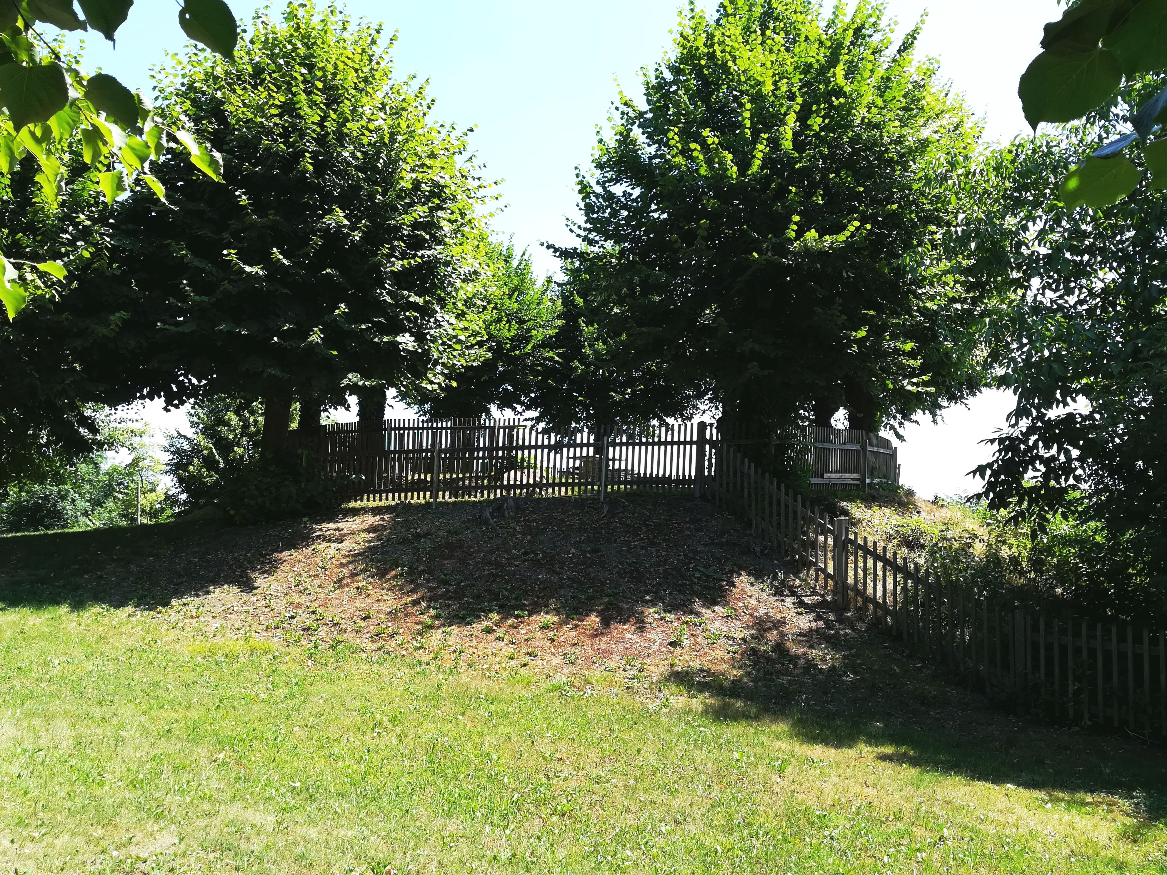 Lageplatz der Alten Ennsburg (heute im "Schlosspark am Georgenberg")